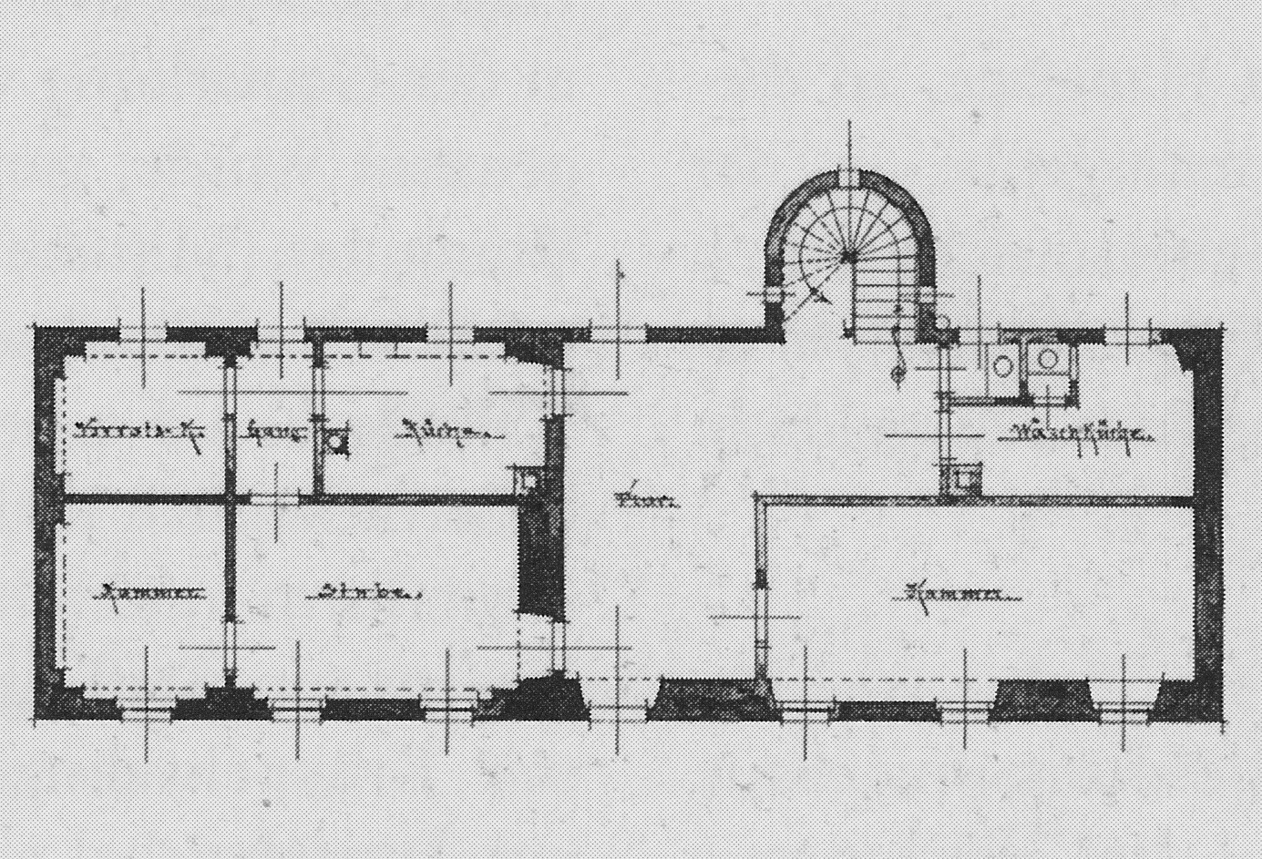 Radebeul Traiteurhaus Grundriss 19. Jahrhundert